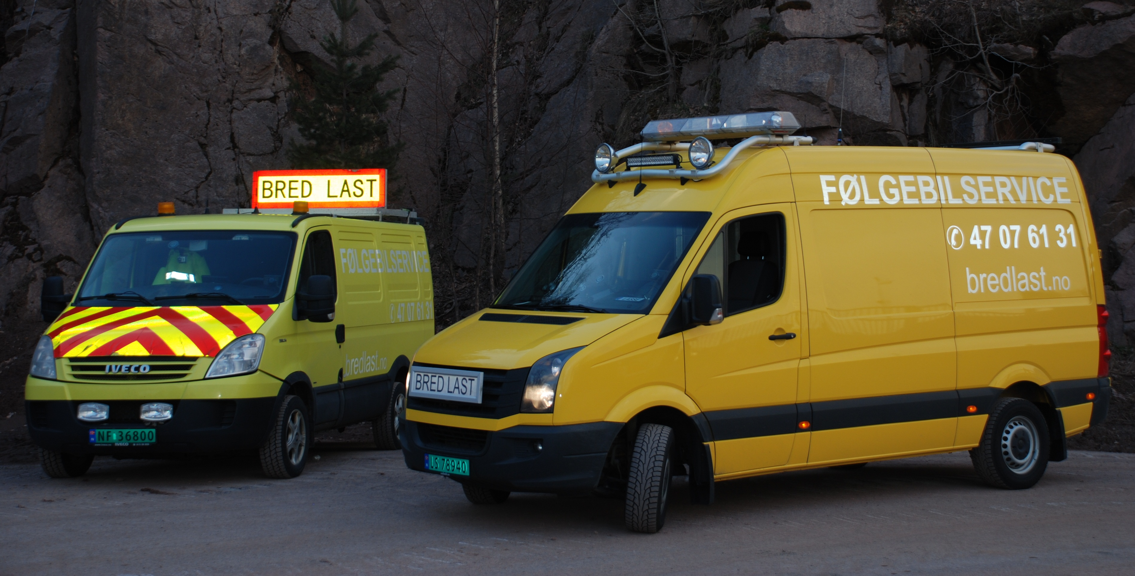 Norske følgebiler